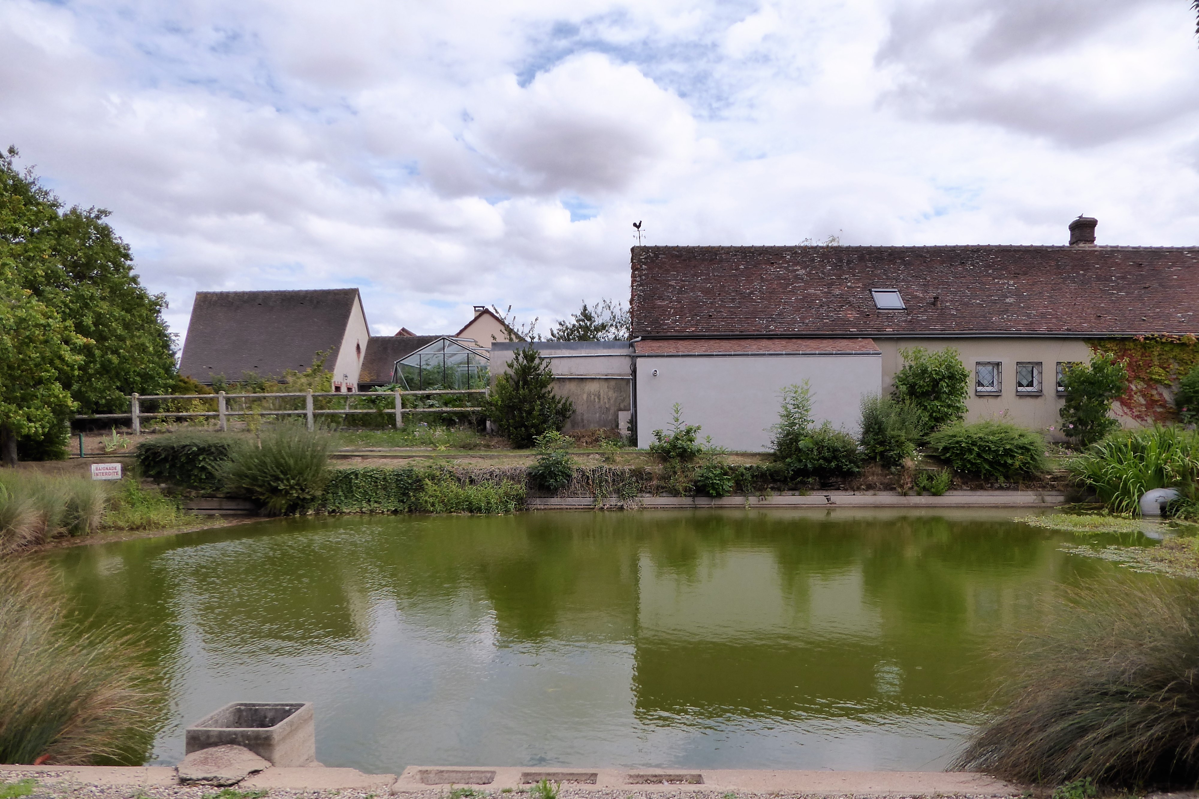 La mare, Briconville, Eure-et-Loir (France).